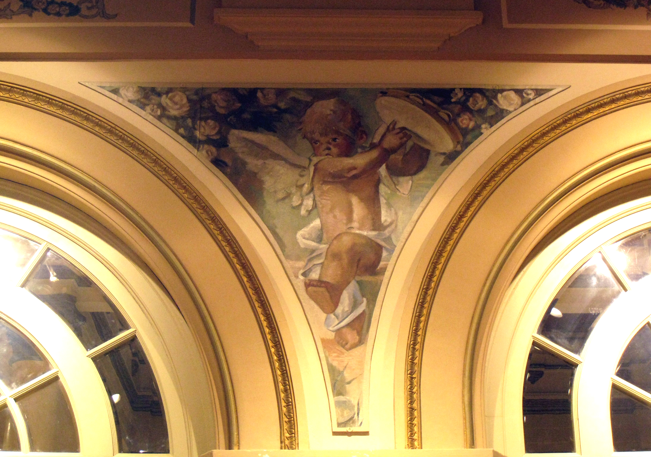 Gran Casino, de Lluís Muncunill (1920), al carrer de la Font Vella (Terrassa). Actualment acull la cooperativa Abacus. Pintures del pis principal.